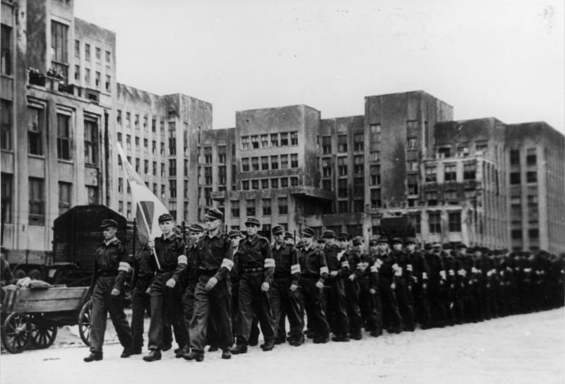 Weißrussland, Minsk ADN-Bildarchiv II. Weltkrieg 1939-45 In den von faschistischen deutschen Truppen besetzten Gebieten der Sowjetunion; Juni 1944 Auf dem Weg zum Bahnhof marschieren in Minsk Jugendliche aus Belorussland unter einer Fahne in den Landesfarben weiß-rot-weiß am Präsidenten des Weißruthenischen Zentralrates, Prof. Astrovsky, vorbei. Sie sollen in Deutschland für den Kriegseinsatz ausgebildet werden. Aufnahme: Sachert Information added by Wikimedia users.Беларуская (тарашкевіца): Па дарозе на вакзал маршыруюць маладзёны зь Беларусі. Чэрвень 1944 году.